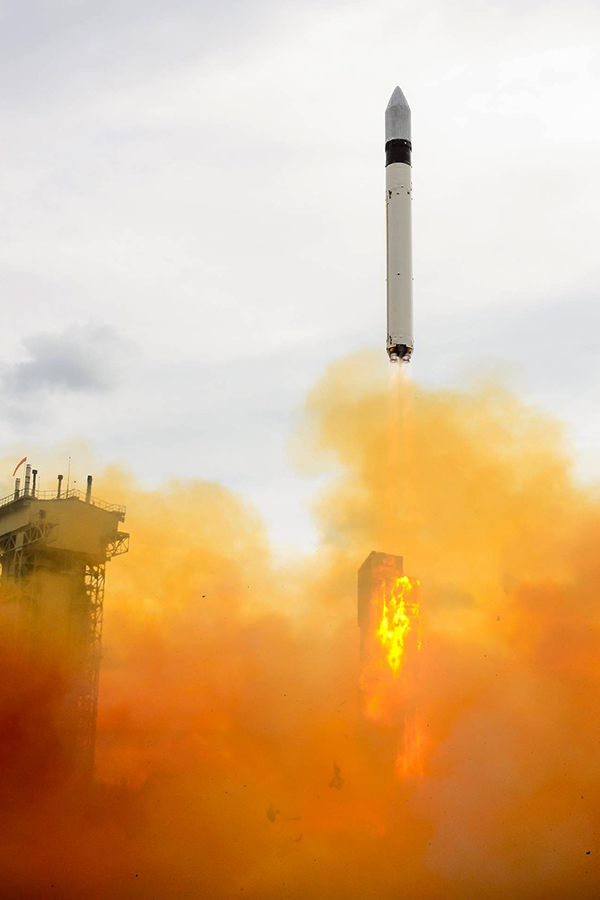 Пуск ракеты космического назначения легкого класса «Рокот» с блоком космических аппаратов связи «Гонец-М» (ГИК Плесецк, Архангельская обл.)